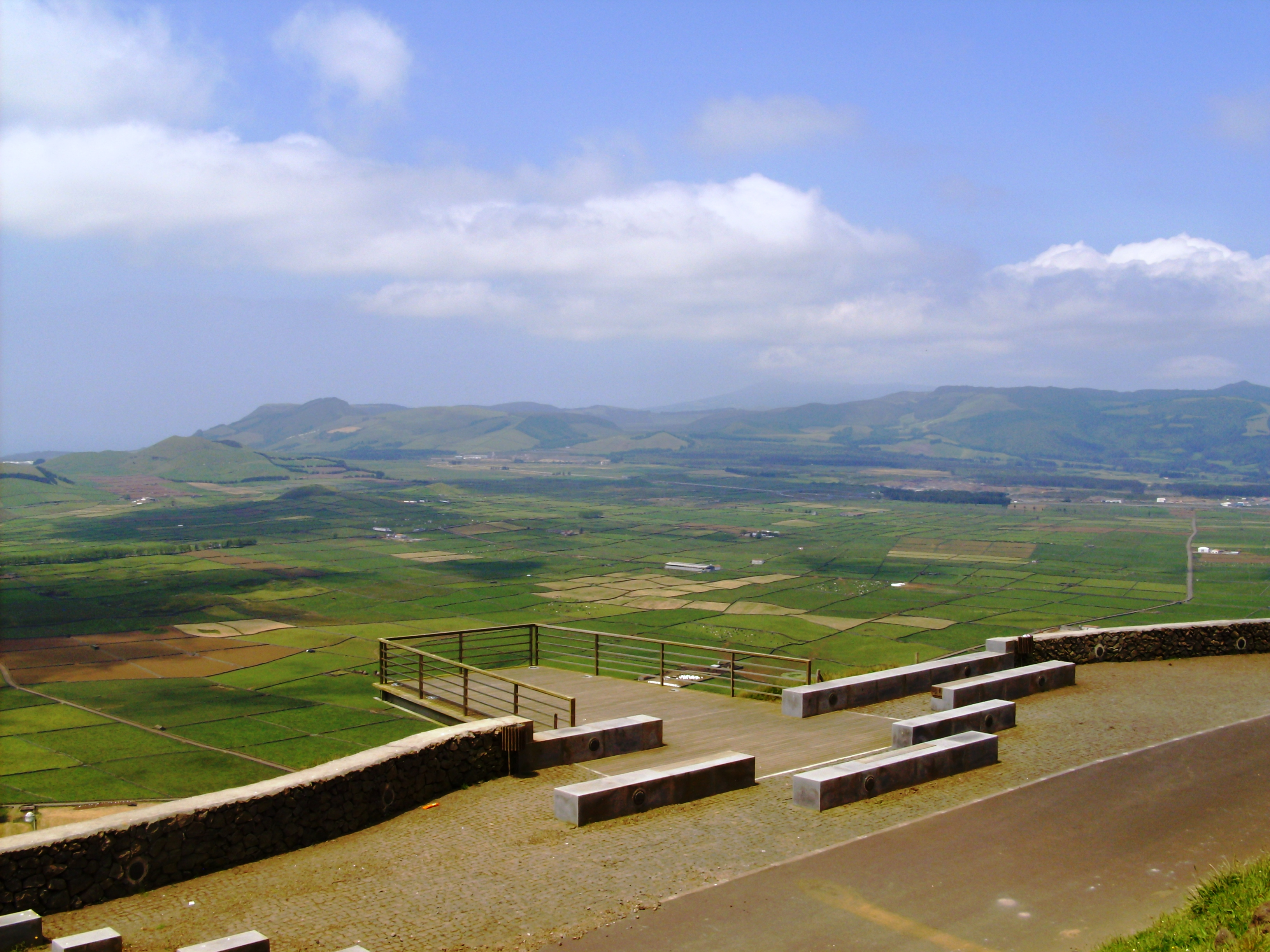 Miradouros da Serra do Cume, Praia da Vitória, ilha Terceira, Açores: planície interior da ilha.